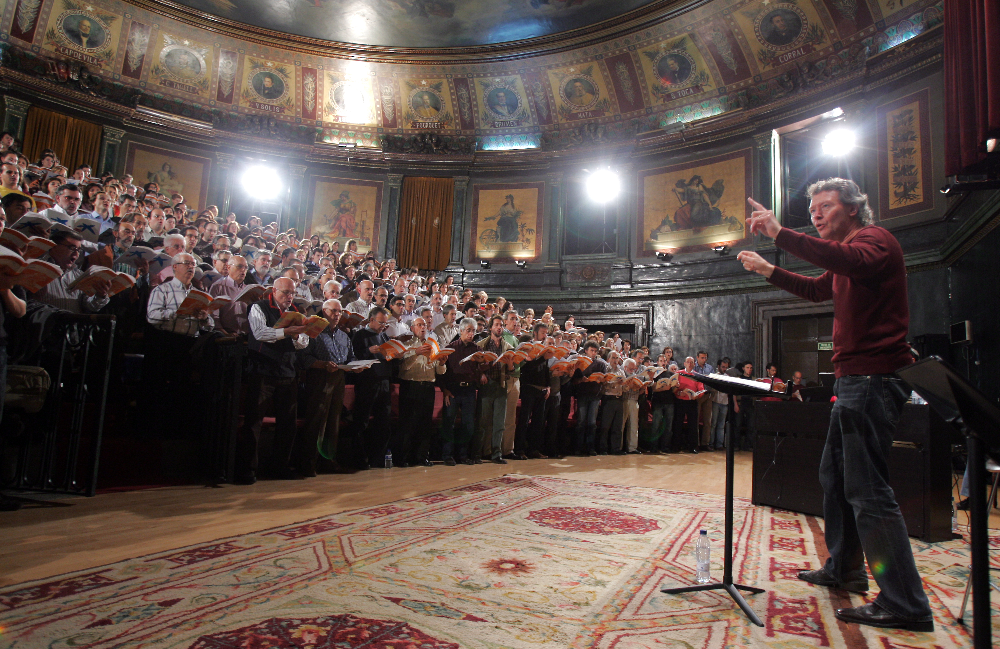 Harry Christophers en uno de los ensayos del Mesías Participativo en Madrid (2009)